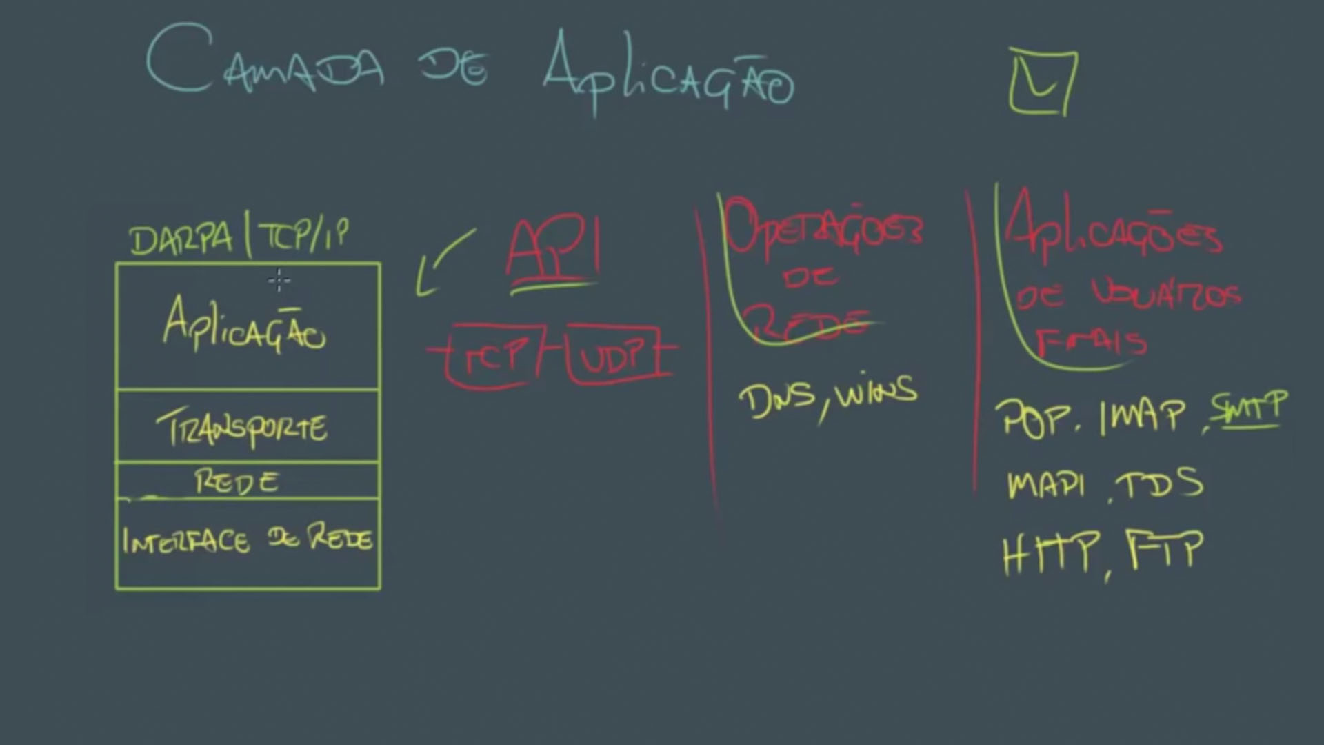 Camada de Aplicacao TCPIP